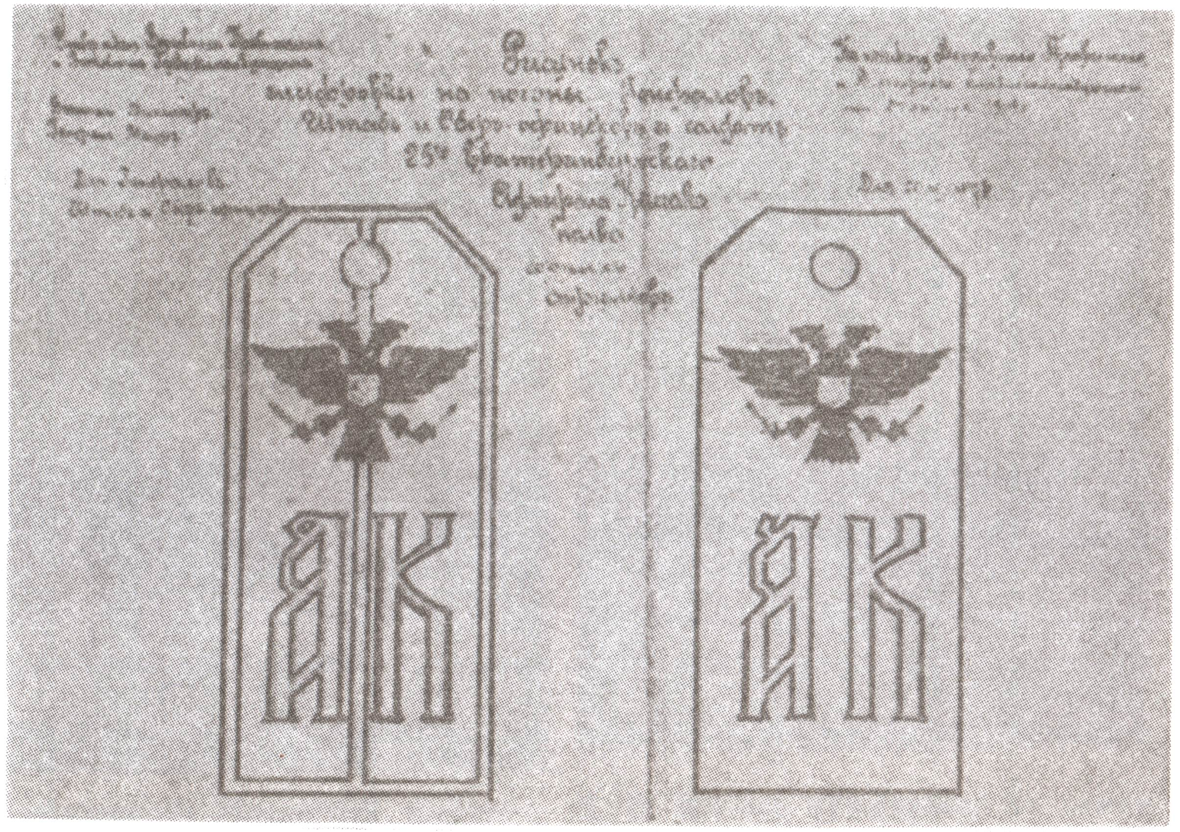 Погоны 25-го Екатеринбургского полка имени адмирала Колчака